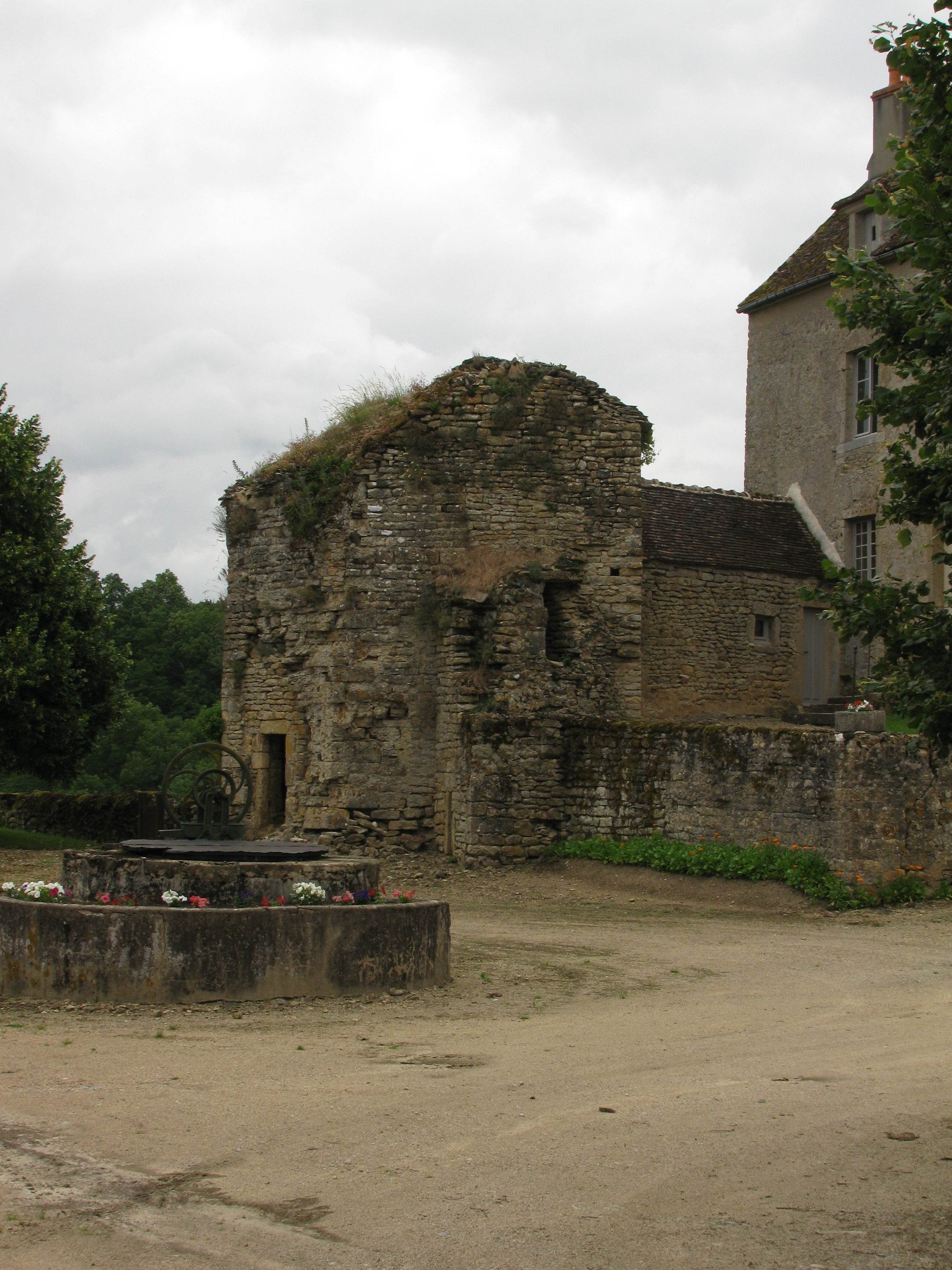 Les vestiges de la tour de la prison, appartenant à l'enceinte extérieure du château de Pierre-Perthuis, Yonne, France.